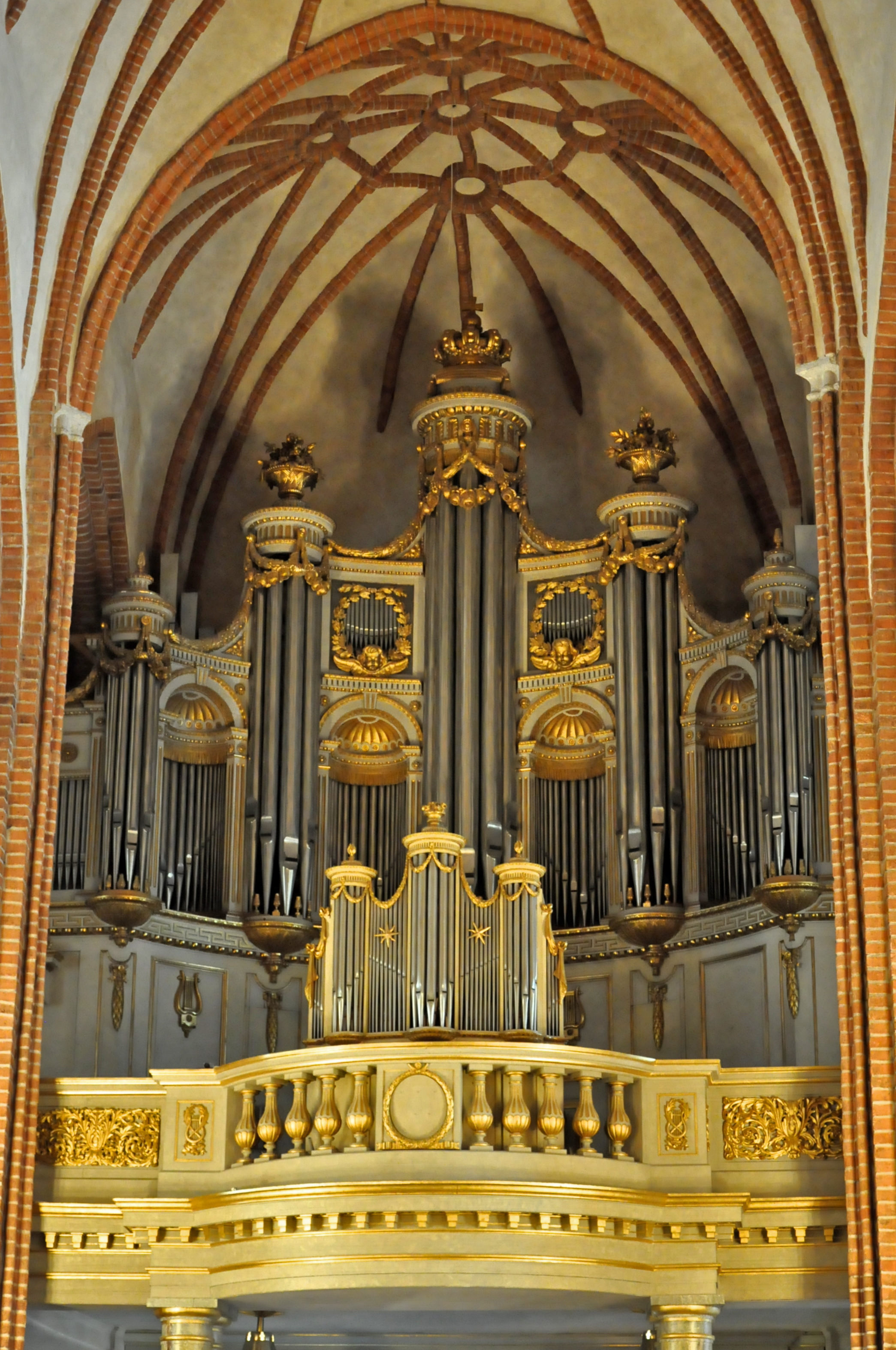 Orgel in Storkyrkan, Sankt Nikolai kyrka, Stockholm